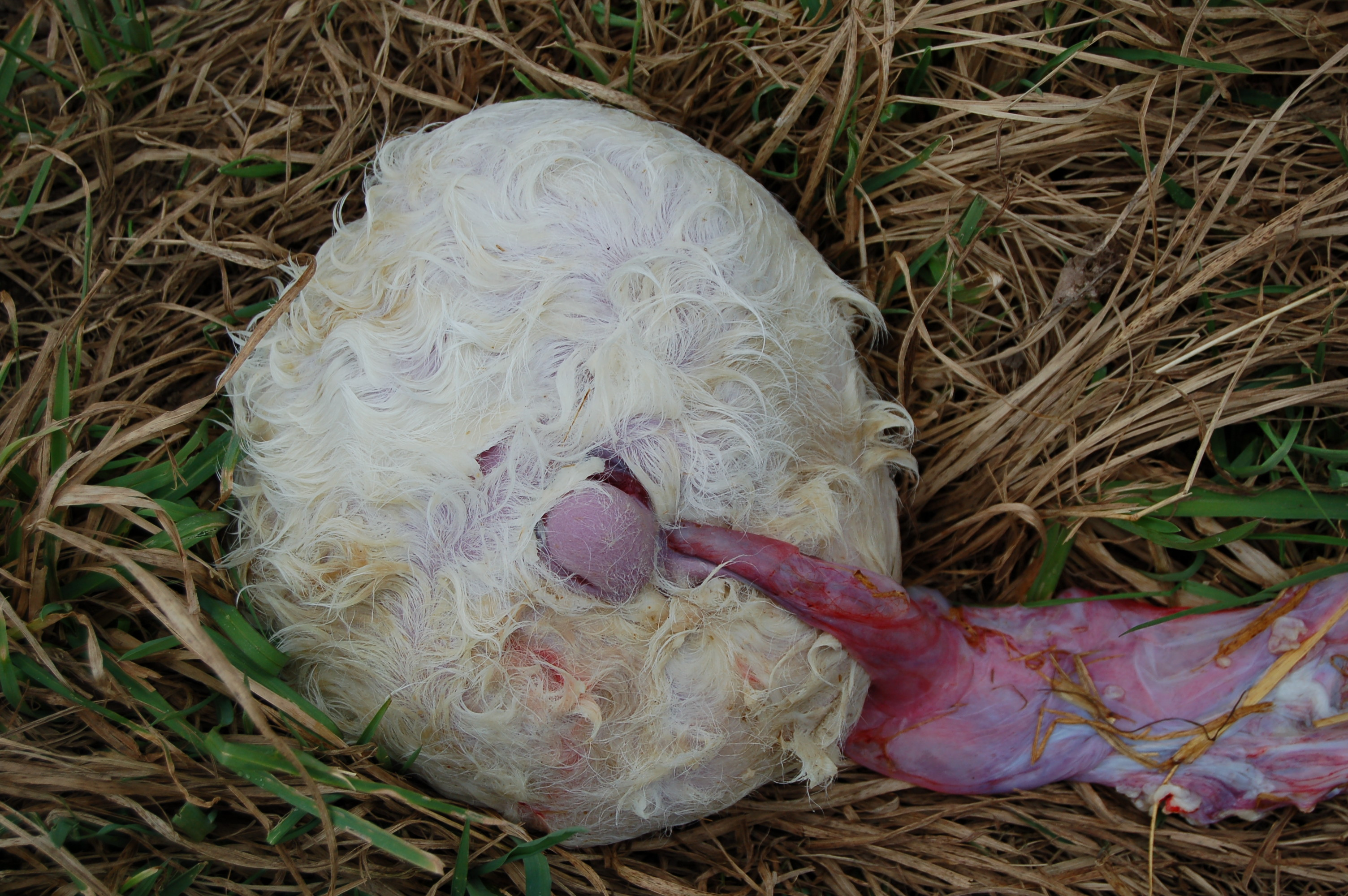 Zwillingsmissbildung bei Fleckviehkuh, nabelseitig